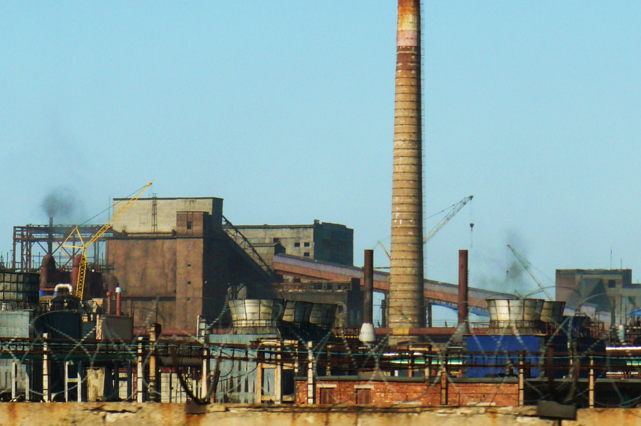 Coke-chemical plants. Avdijivka.